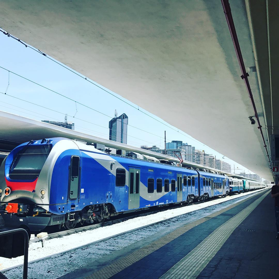 TFA Alfa 2 EAV